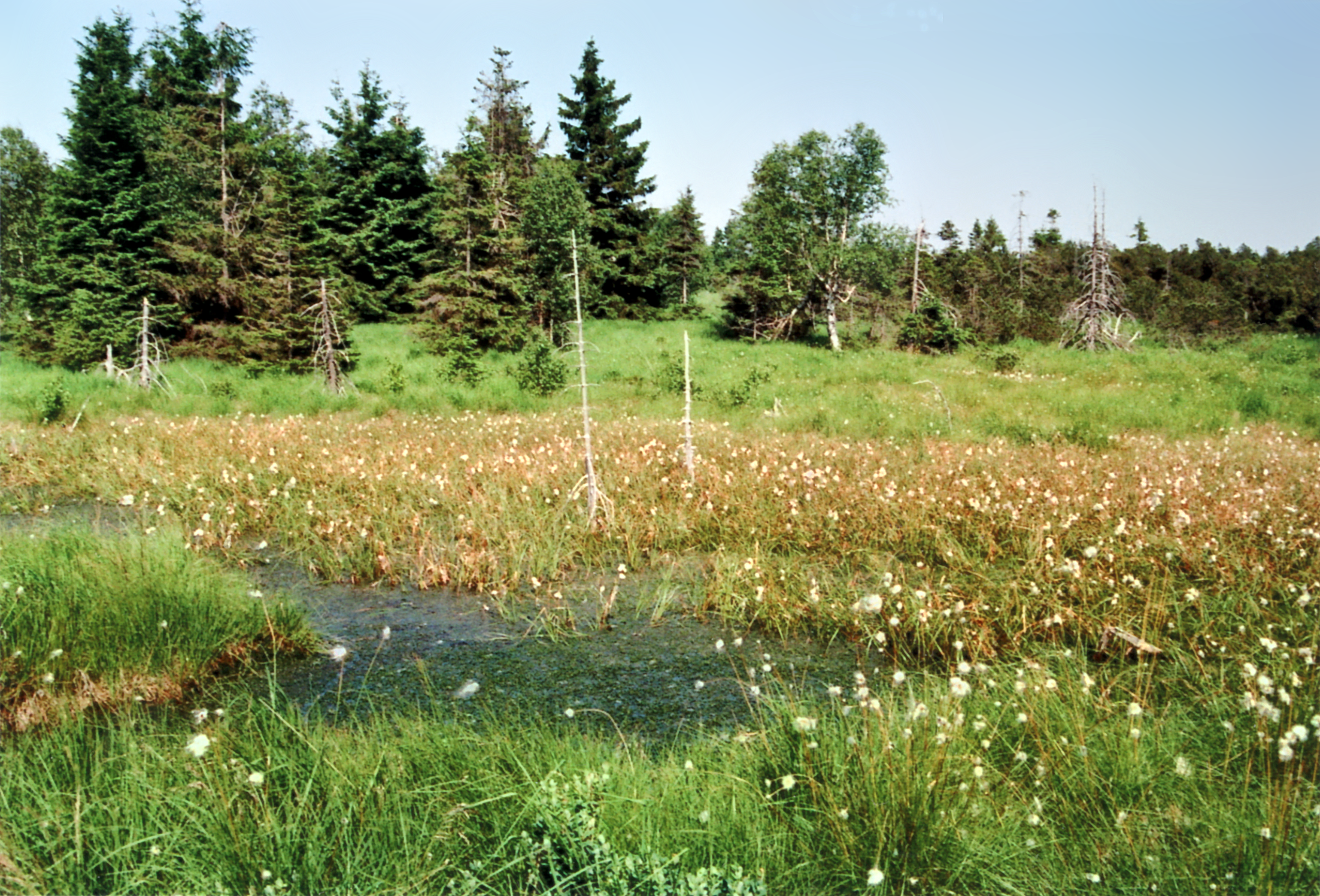 Zinnwald-Georgenfeld - Georgenfelder Hochmoor. Das Georgenfelder Krummholzkiefernmoor entstand vor rund 10.000 Jahren in der Nacheiszeit. Ein Lehrpfad führt durch das Naturschutzgebiet. Aufnahmedatum: 03. Juli 2015